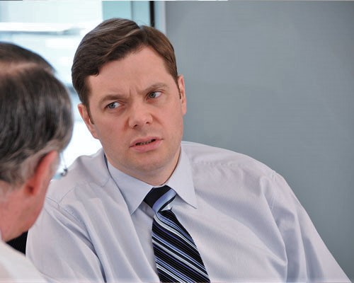 Алексей Мордашов